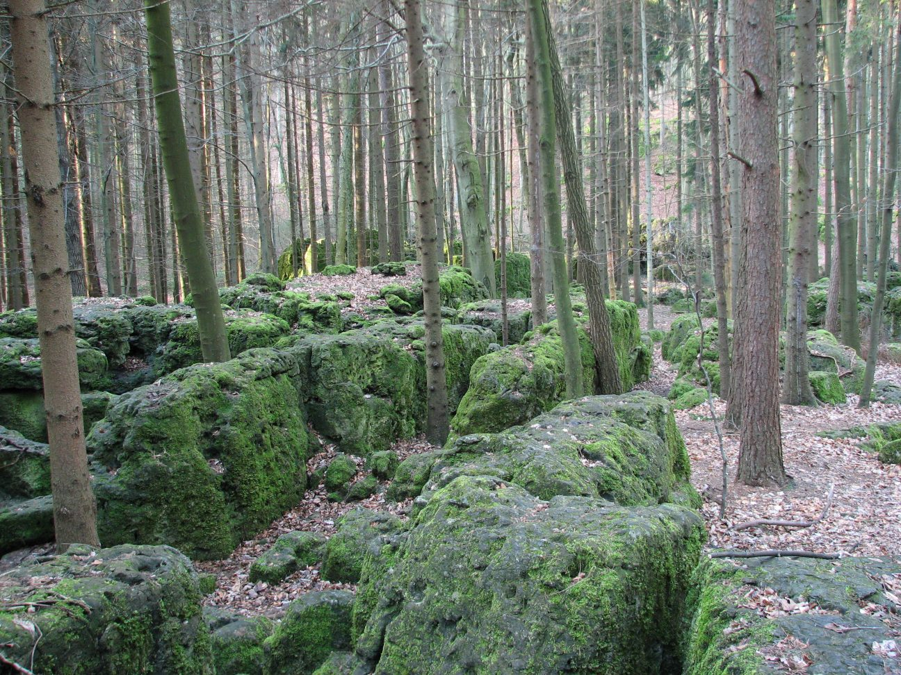 Geotop Druidenhain bei Wohlmannsgesees